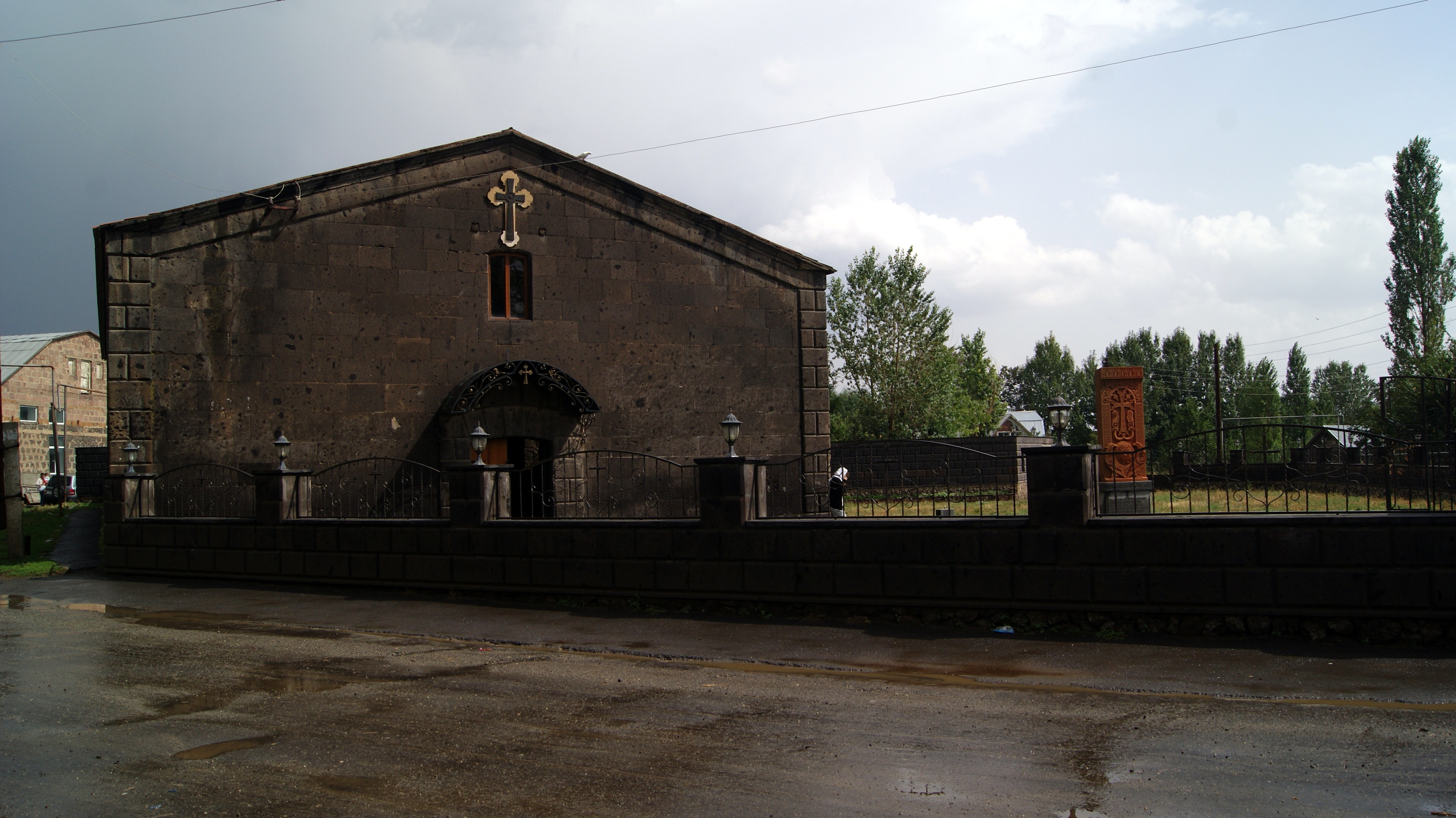 Եկեղեցի Սբ. Աստվածածին, Քուչակ 111/10